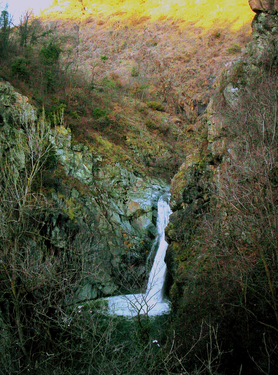 Almese Goja del Pis